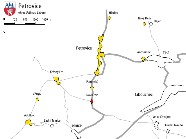 Oblast Petrovice